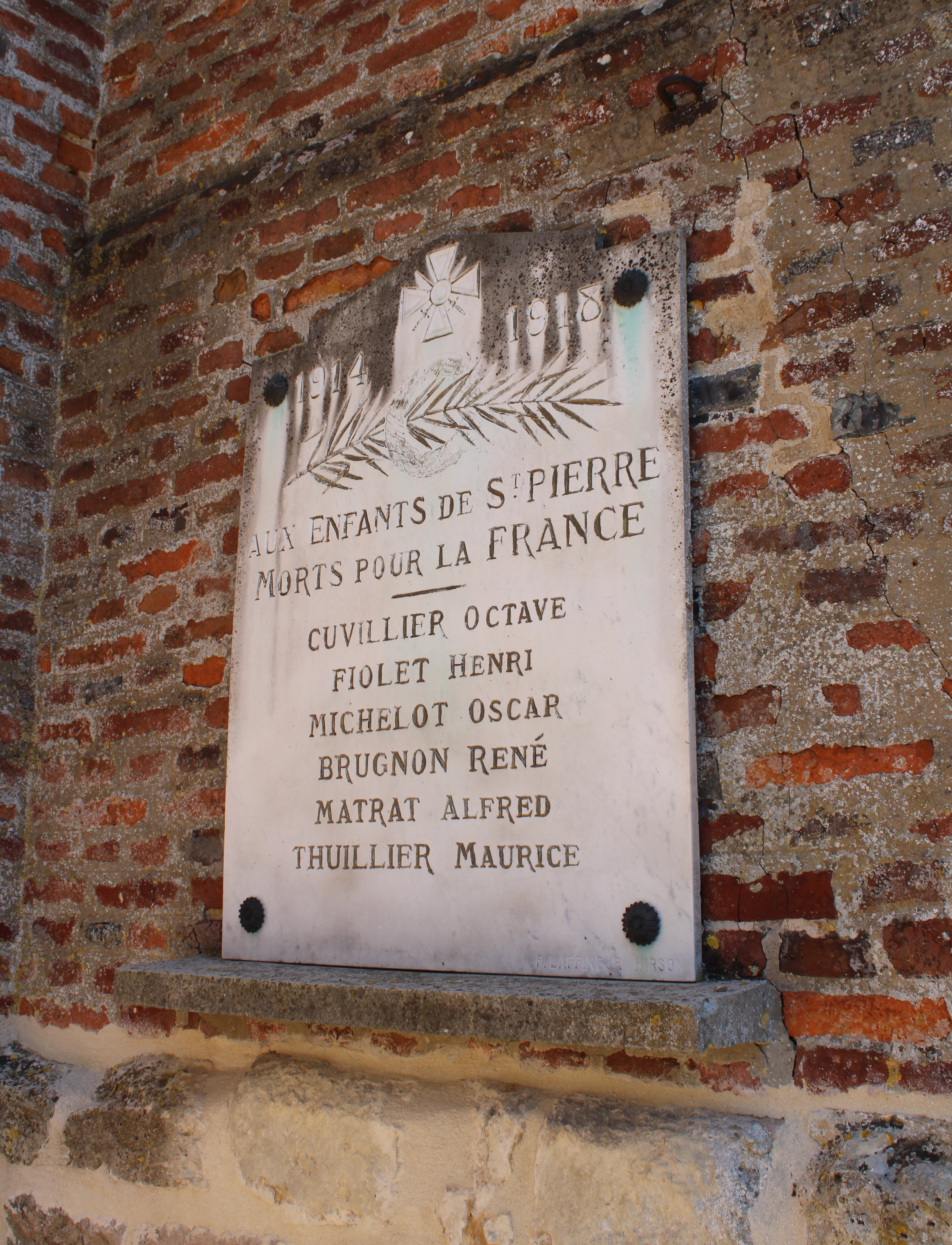 Plaque monument aux morts